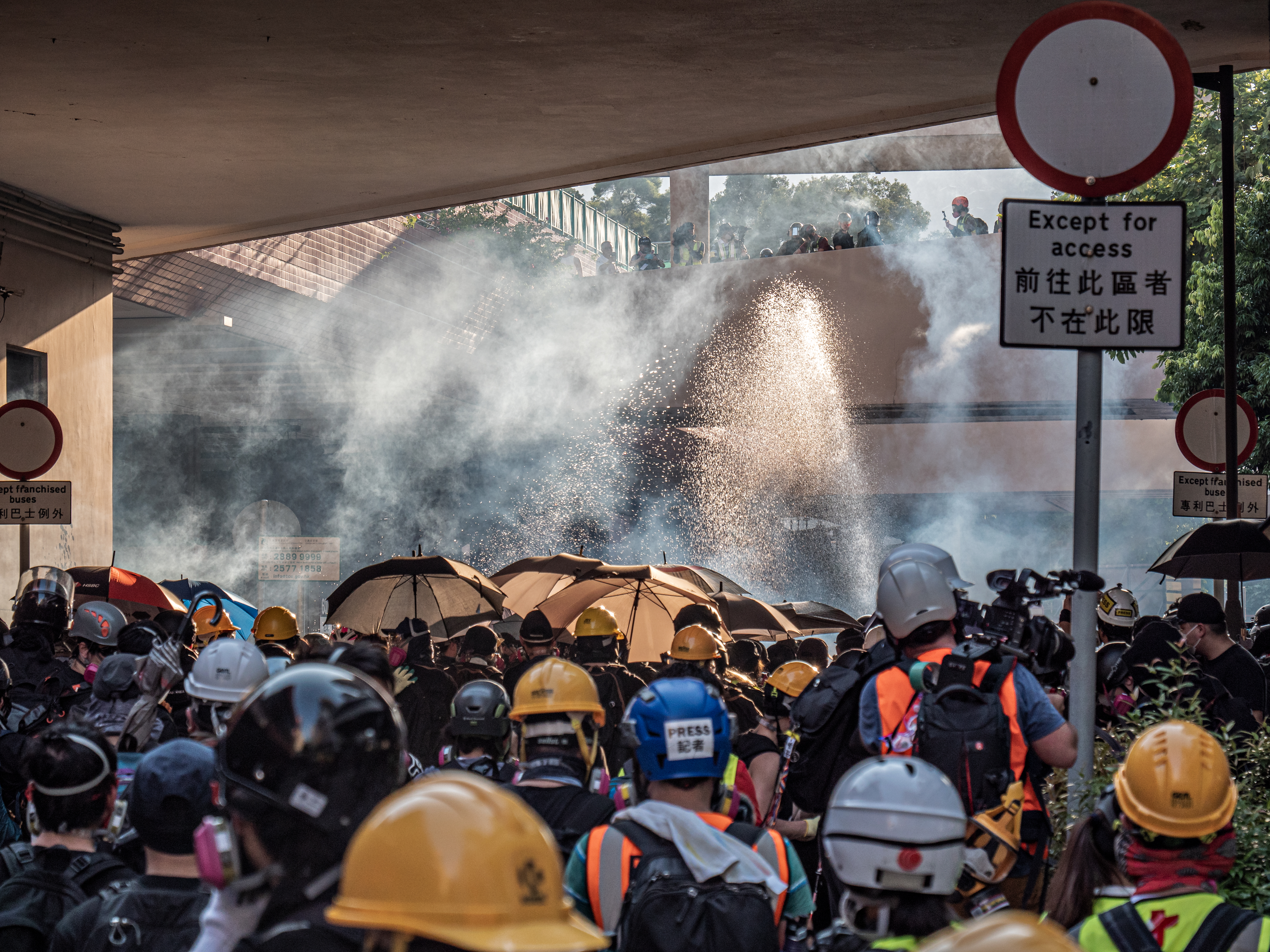 2019-09-22 Tuen Mun 光復屯門公園遊行